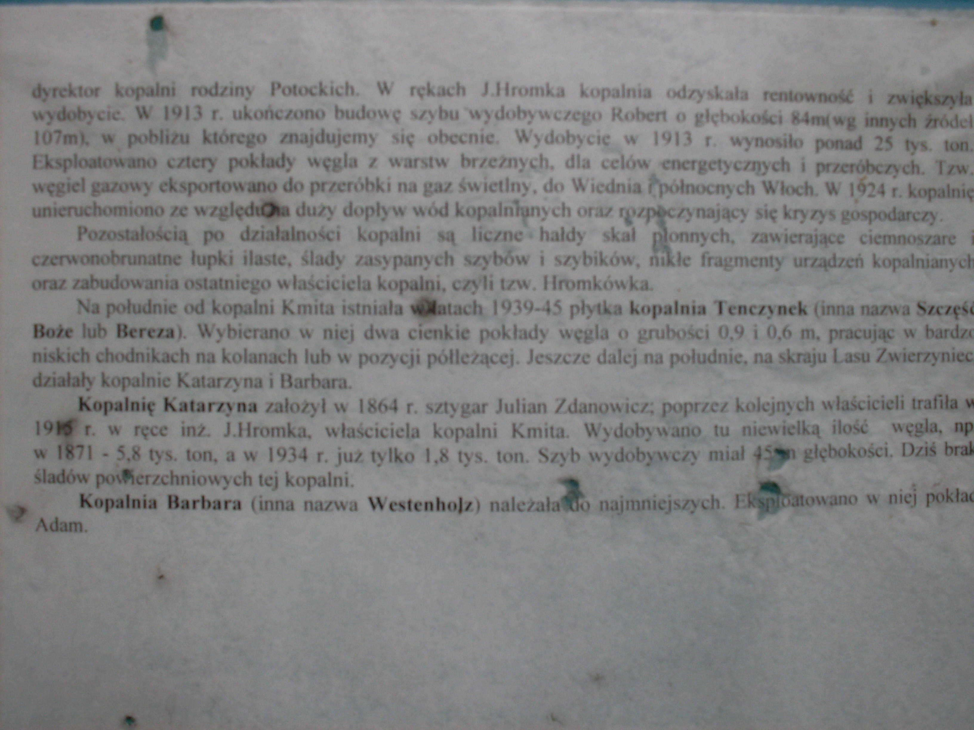 Tablica informacyjna byłej Kopalni Katarzyna w Tenczynku